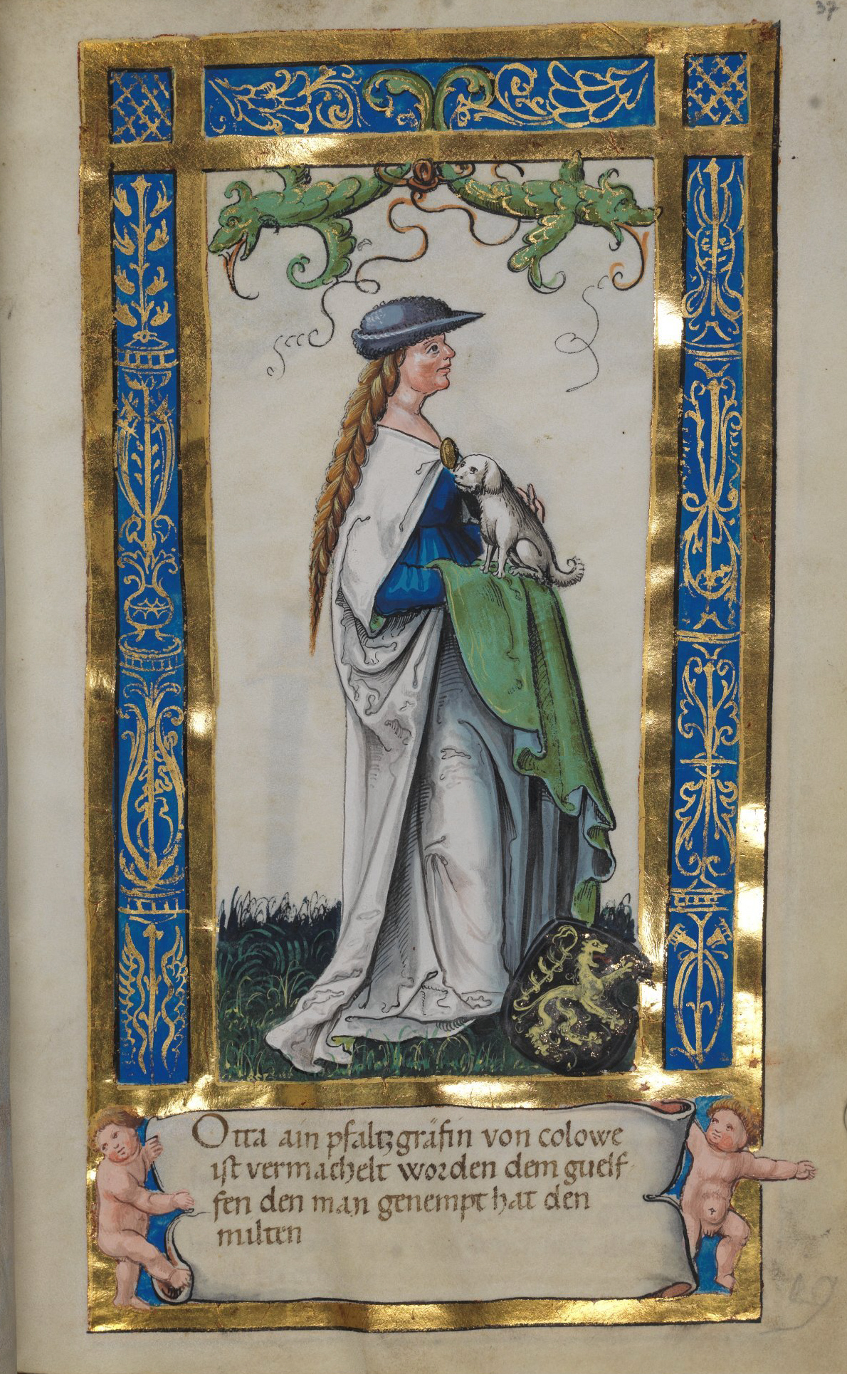 Weingartener Stifterbüchlein, Württembergische Landesbibliothek Stuttgart, Cod.hist.qt.584, fol. 37r, Stifterbild Otta (Uta), Pfalzgräfin von Calw, Ehefrau des Welf VI. Otta ain pfaltzgräfin von colowe ist vermachelt worden dem guelfen den man genempt hat den milten